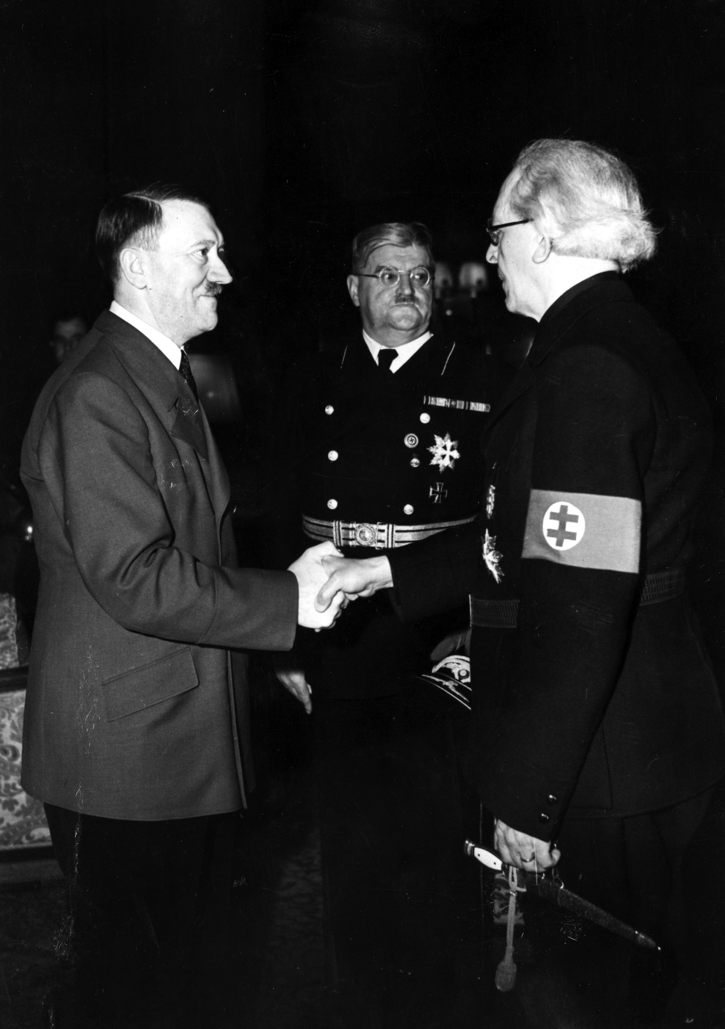 Od lewej: Adolf Hitler, Otto Meissner, Vojtech Tuka.